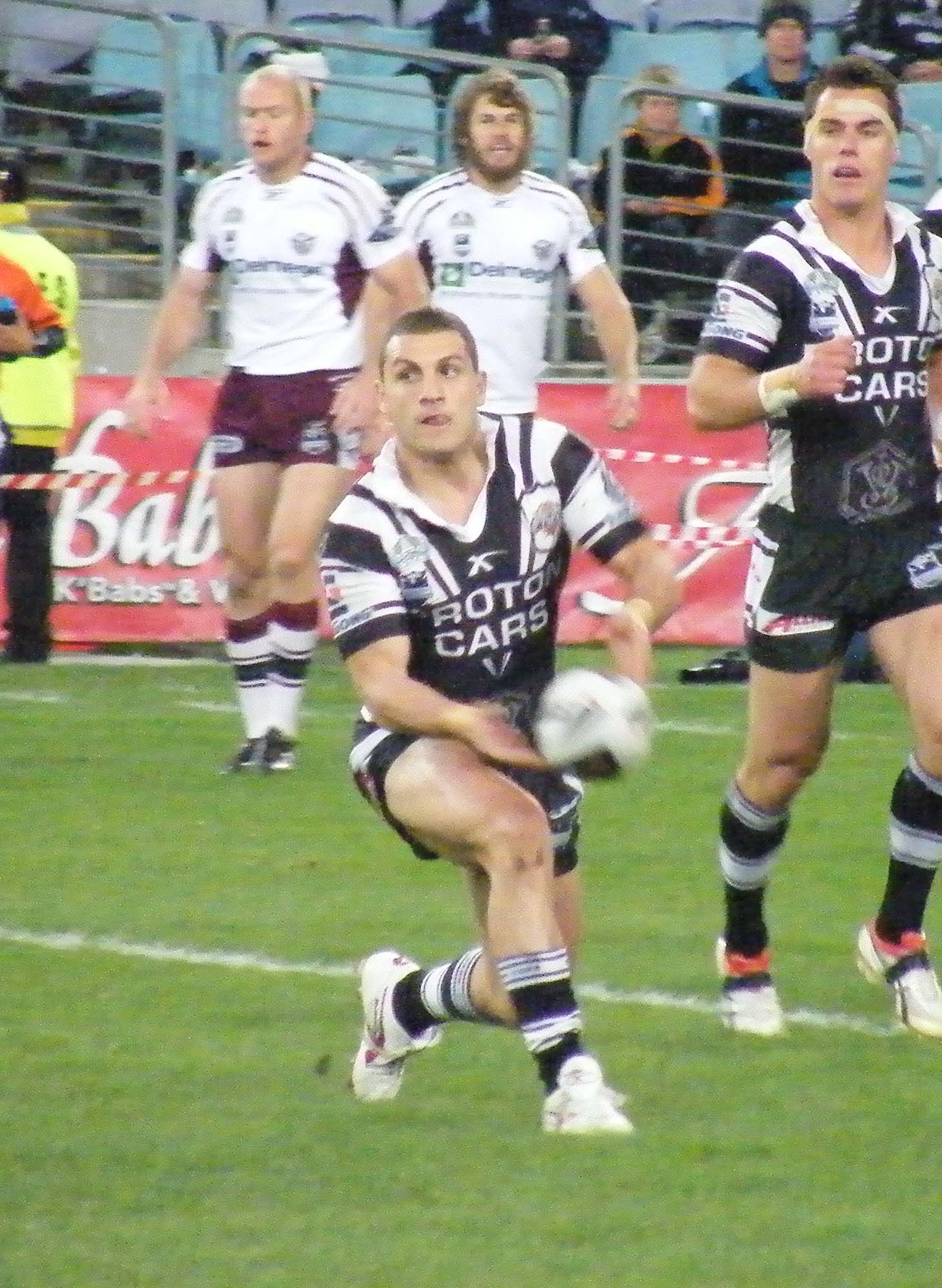 Wests Tigers playmaker Robbie Farah